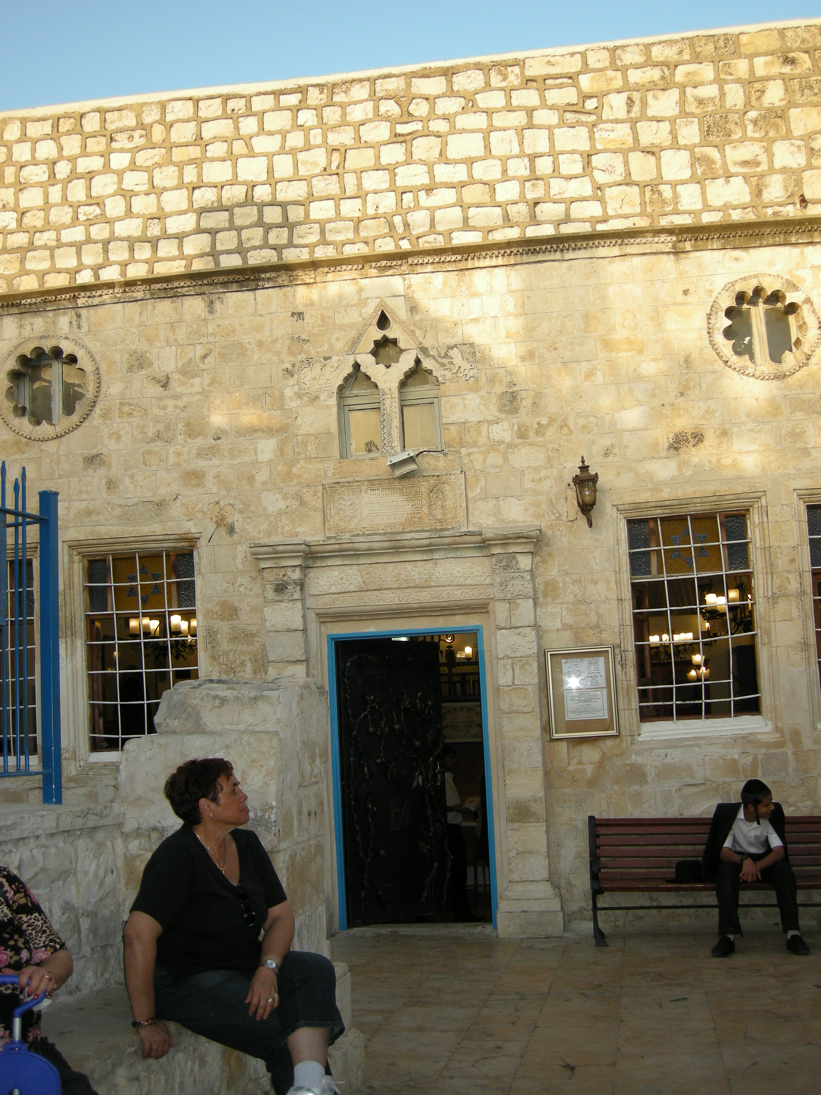 Safed